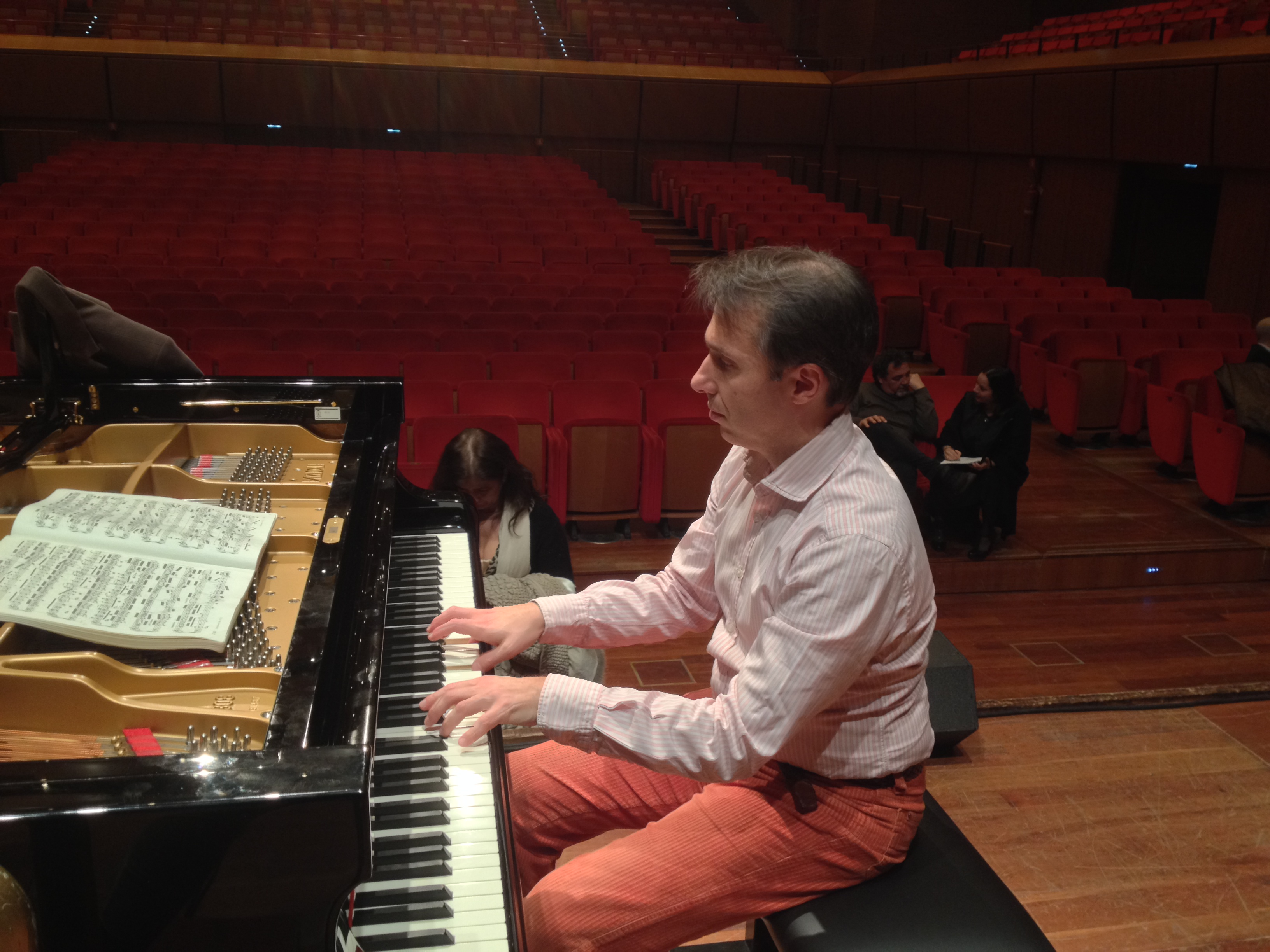 Il pianista Maurizio Baglini mentre prova all'Accademia di Santa Cecilia